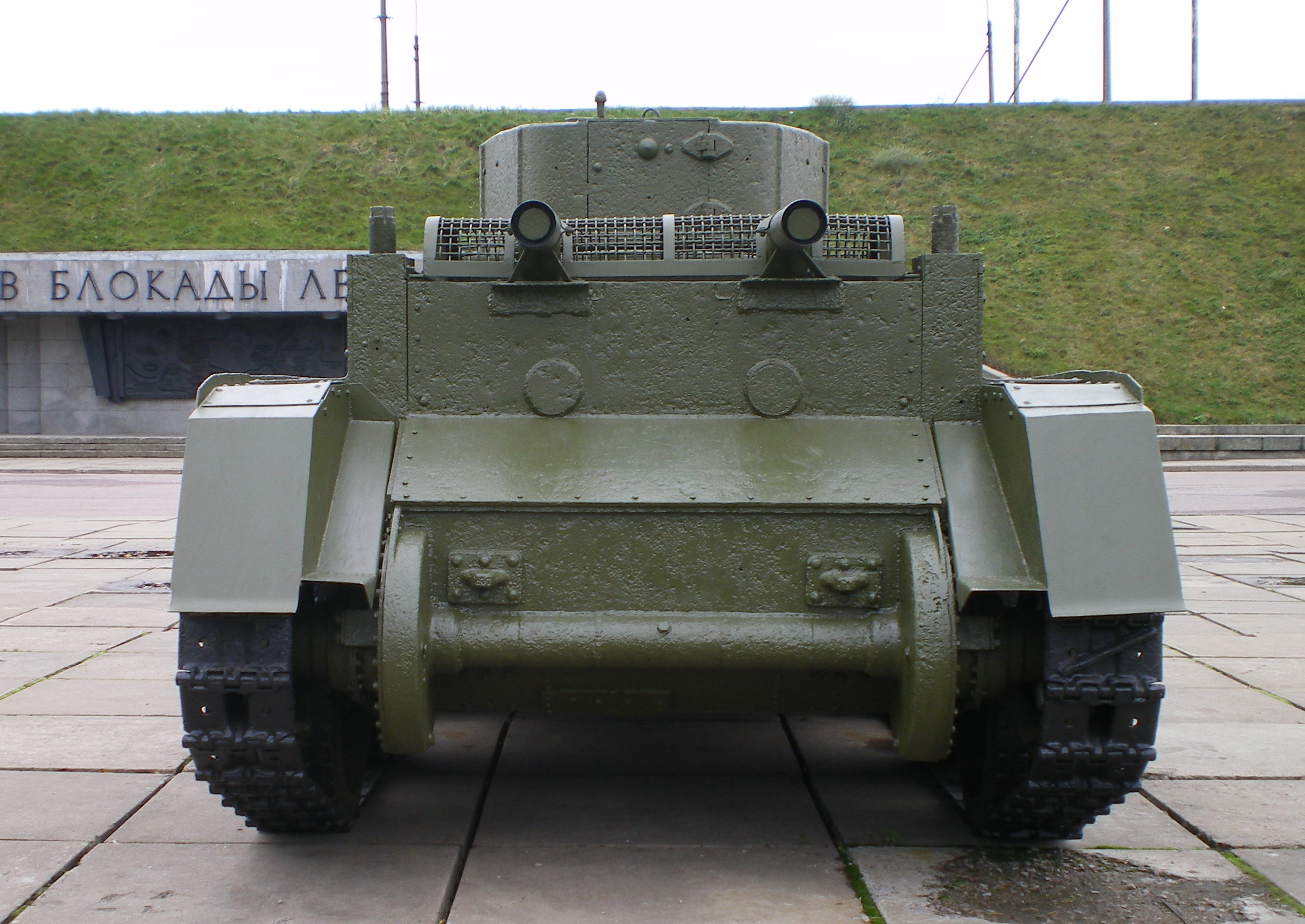 Танк БТ. Вид сзади. Диорама «Прорыв блокады Ленинграда». Экспозиция военной техники периода 1941–1944 годов под открытым небом.